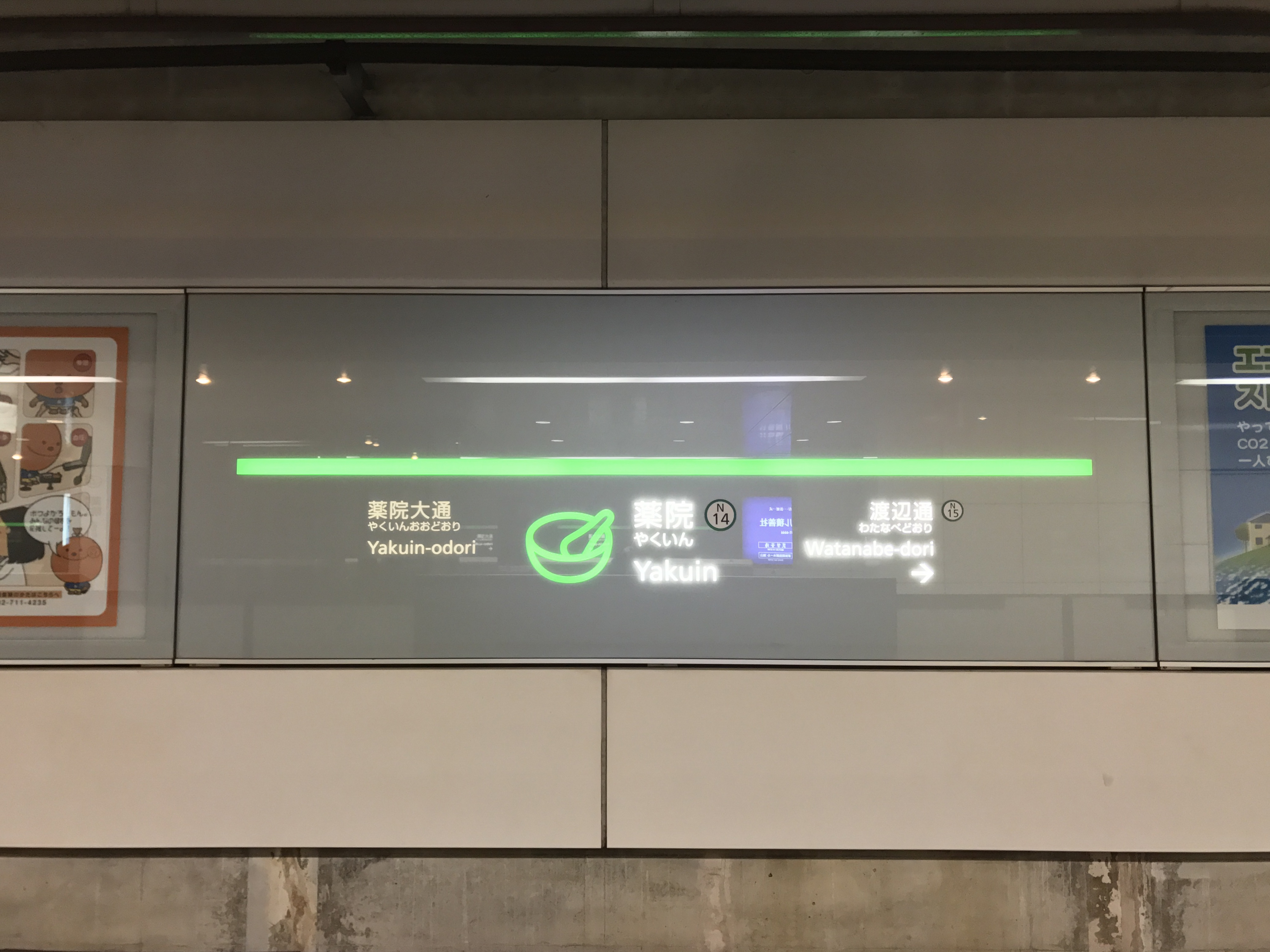 薬院駅(福岡市営地下鉄)の駅名標。イラストは乳鉢と乳棒